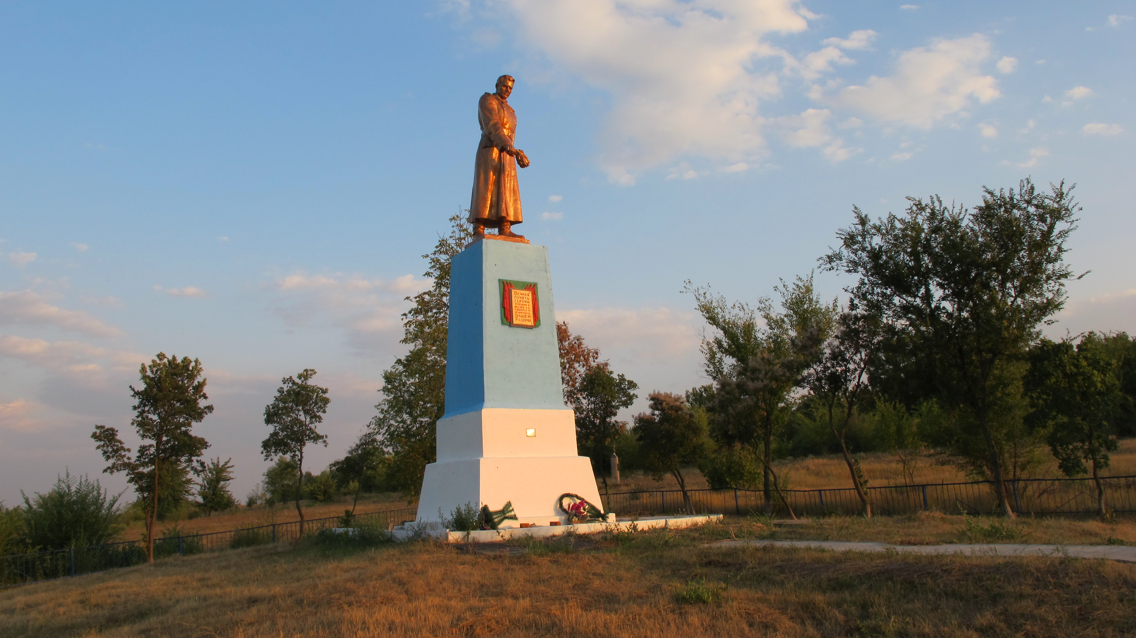 Памятник воїнам ІІ світової війни